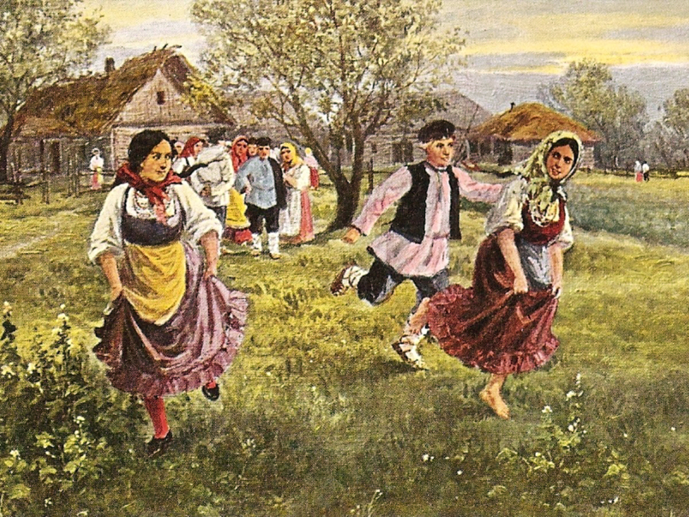 Игра «Горелки». Дореволюционная открытка.